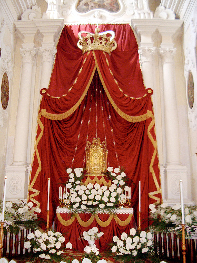 Giovedì Santo. Sepolcro allestito nella chiesa e confraternita della SS. Trinità e delle Anime del Purgatorio di Gallipoli